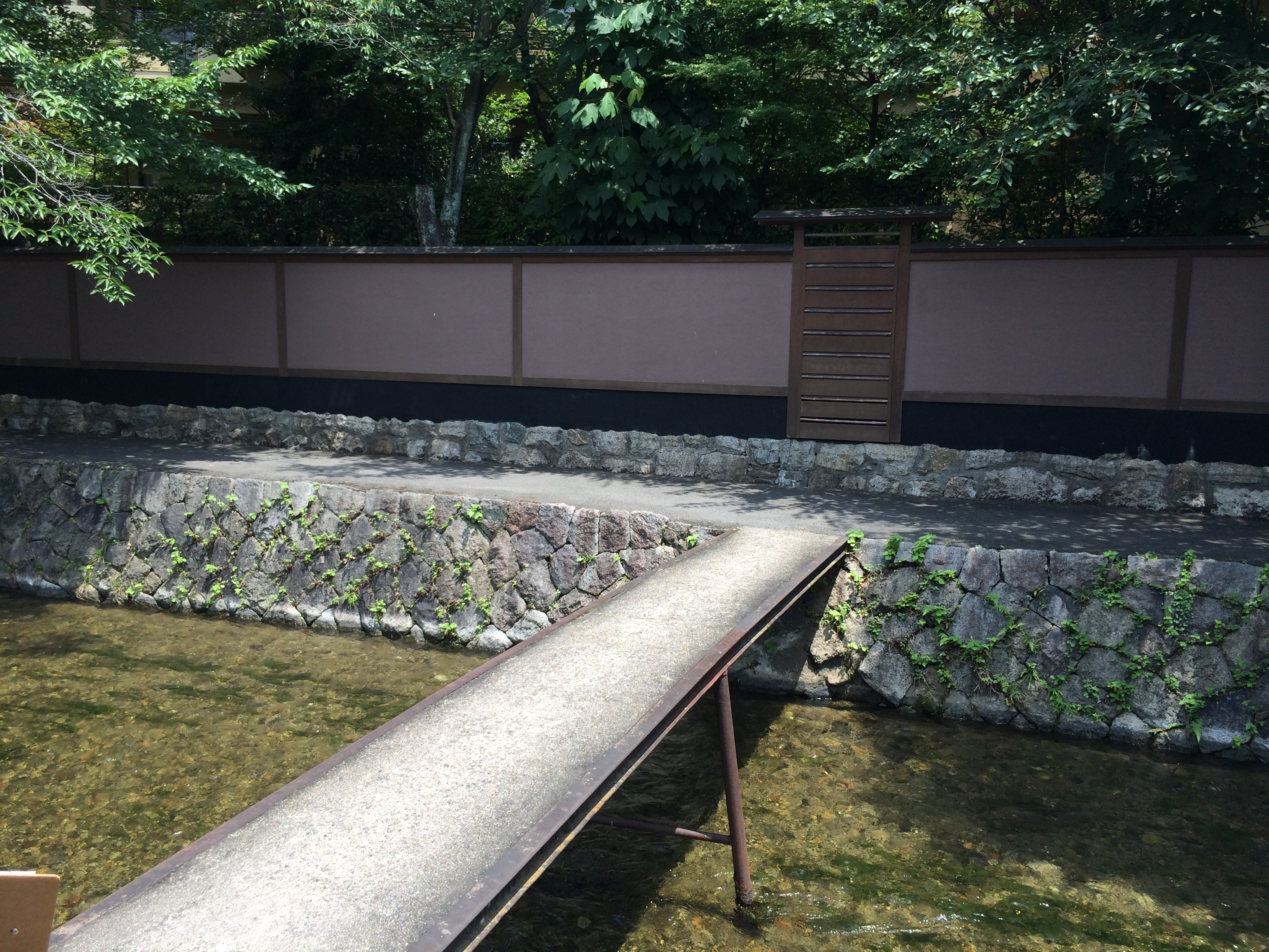 白川にかかる名前のない一本橋（地域での俗称等もなし）。 白川左岸のマンションがニチレイの工場であったころ、製氷に利用されていたおがくずを右岸の広場に干しに行く際に、この橋が利用された。